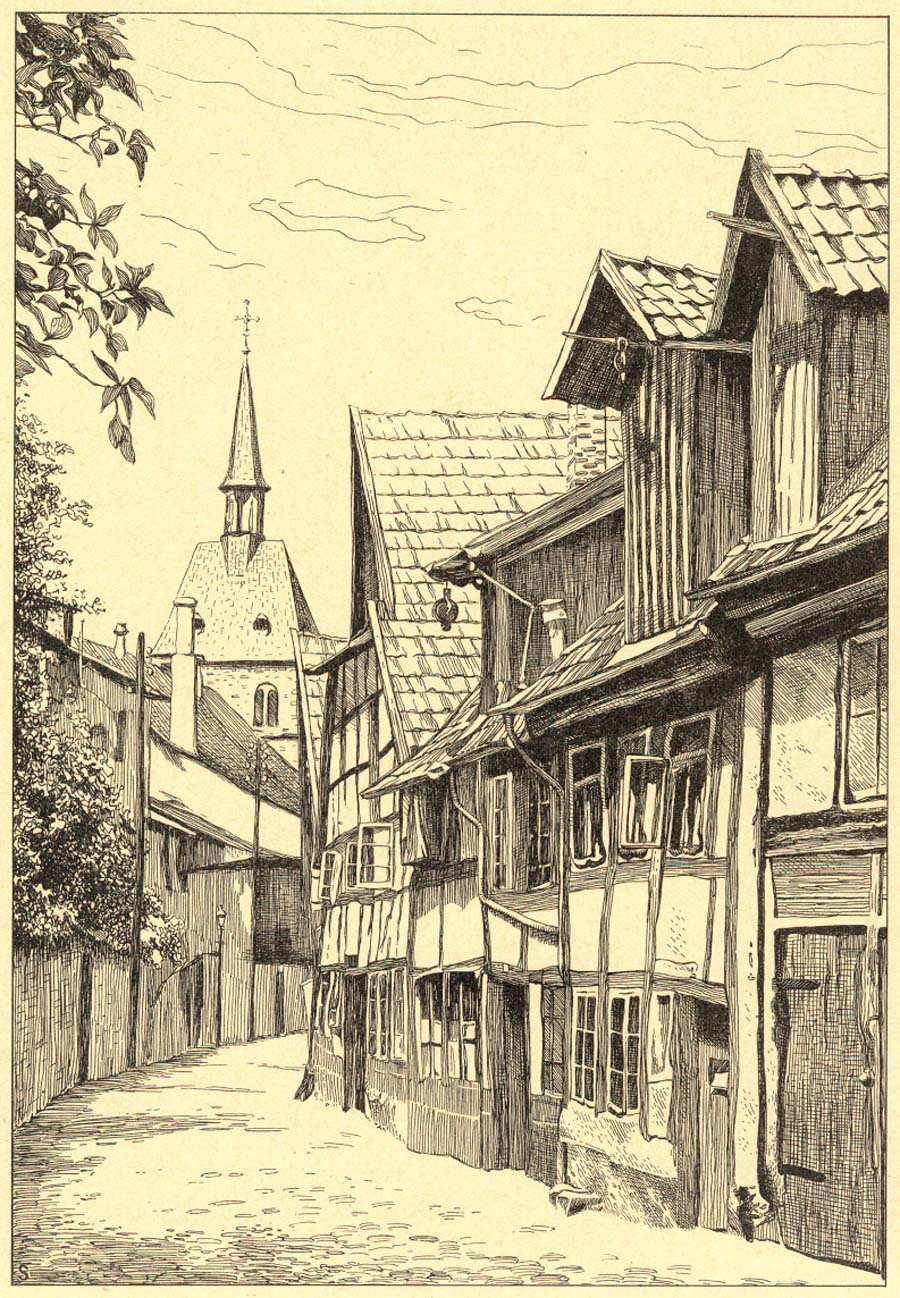 Lithografie: Federzeichnung, Bruchmauerstraße in Detmold um 1951.